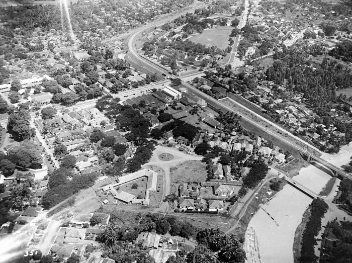 Repronegatief. Luchtfoto van Batavia (meester Cornelis), met de Tjiliwoeng-rivier